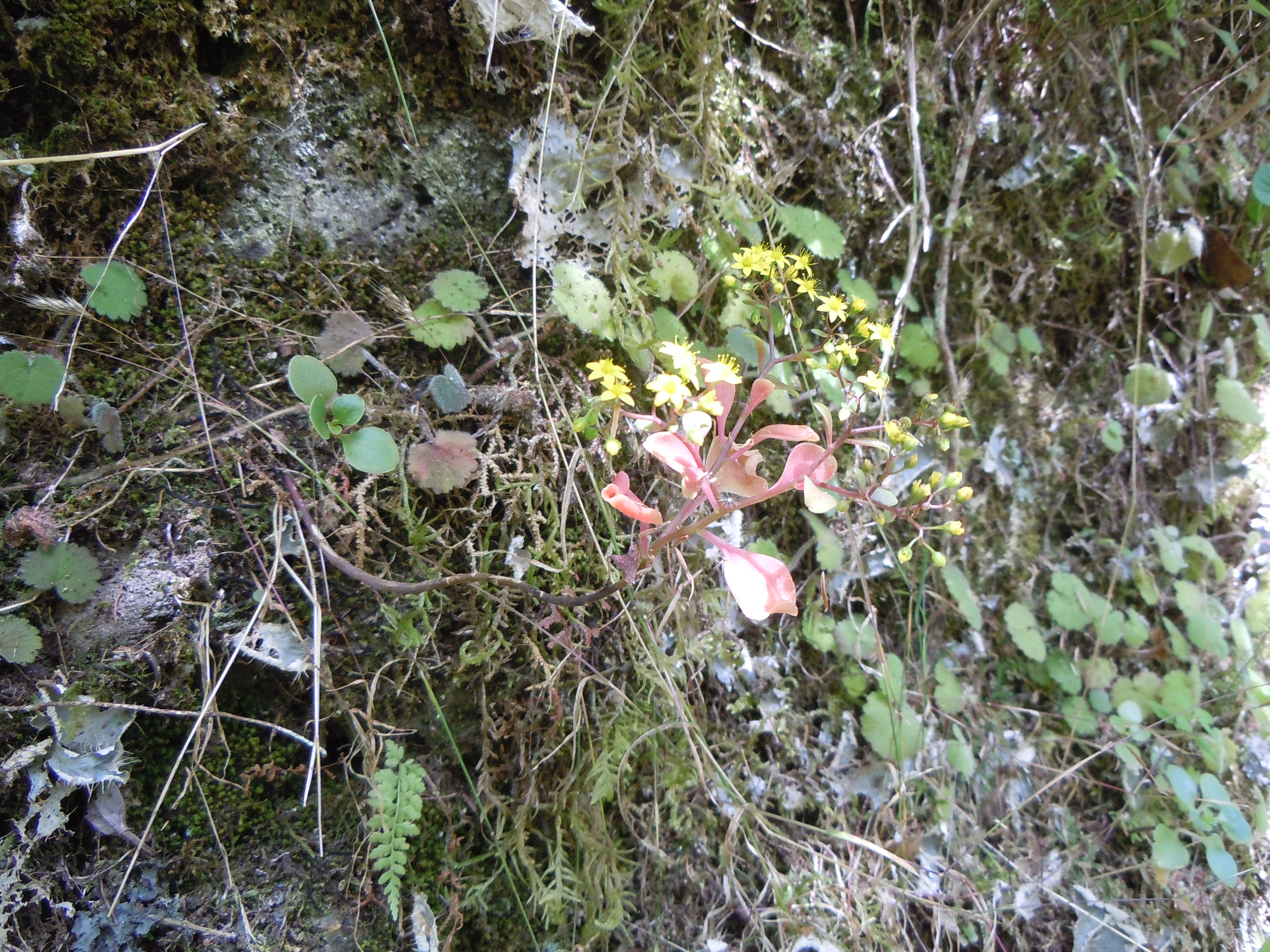 Aichryson divaricatum- Levada do Caldeirão Verde - Madere